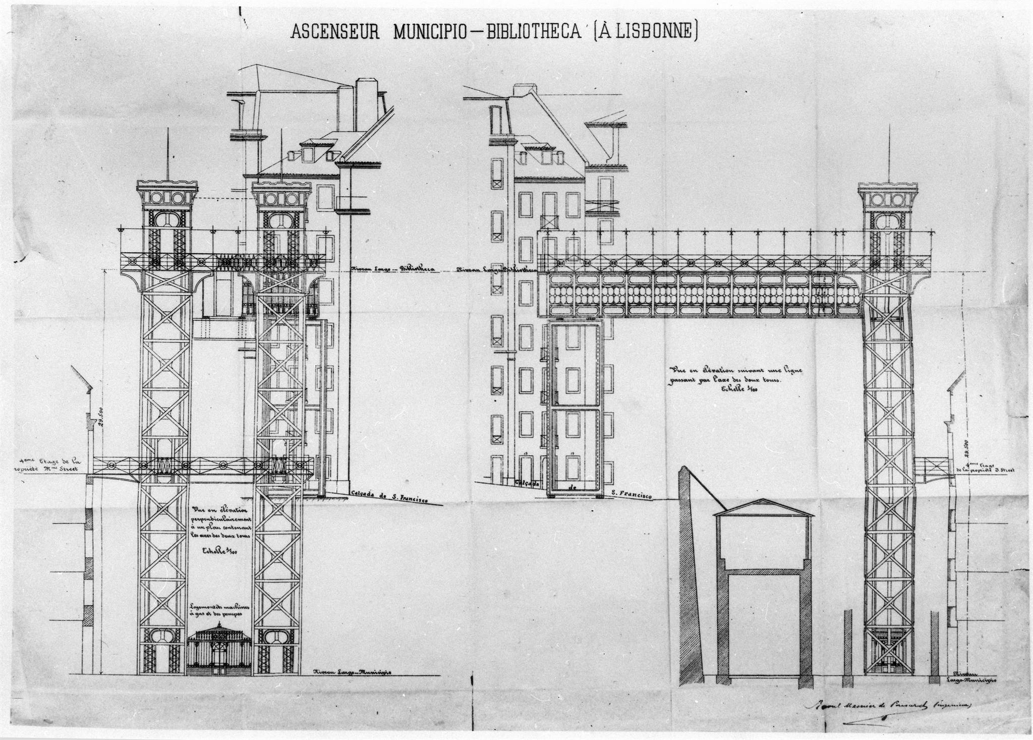 Alçado do projecto do Elevador do Município, Lisboa.